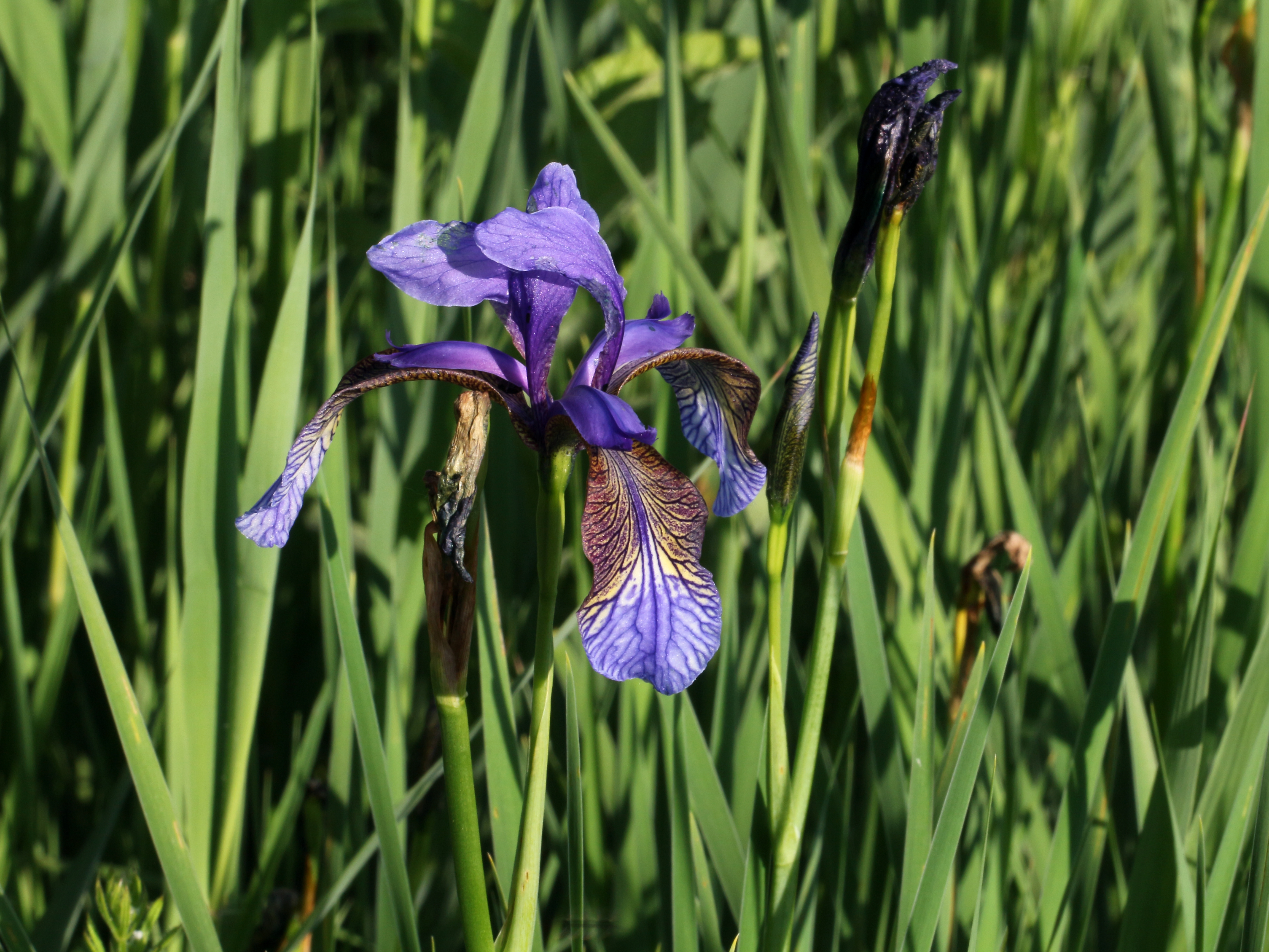 Sibirische Schwertlilie auf der Salzwiese This media shows the natural monument in Vienna with the ID 719.